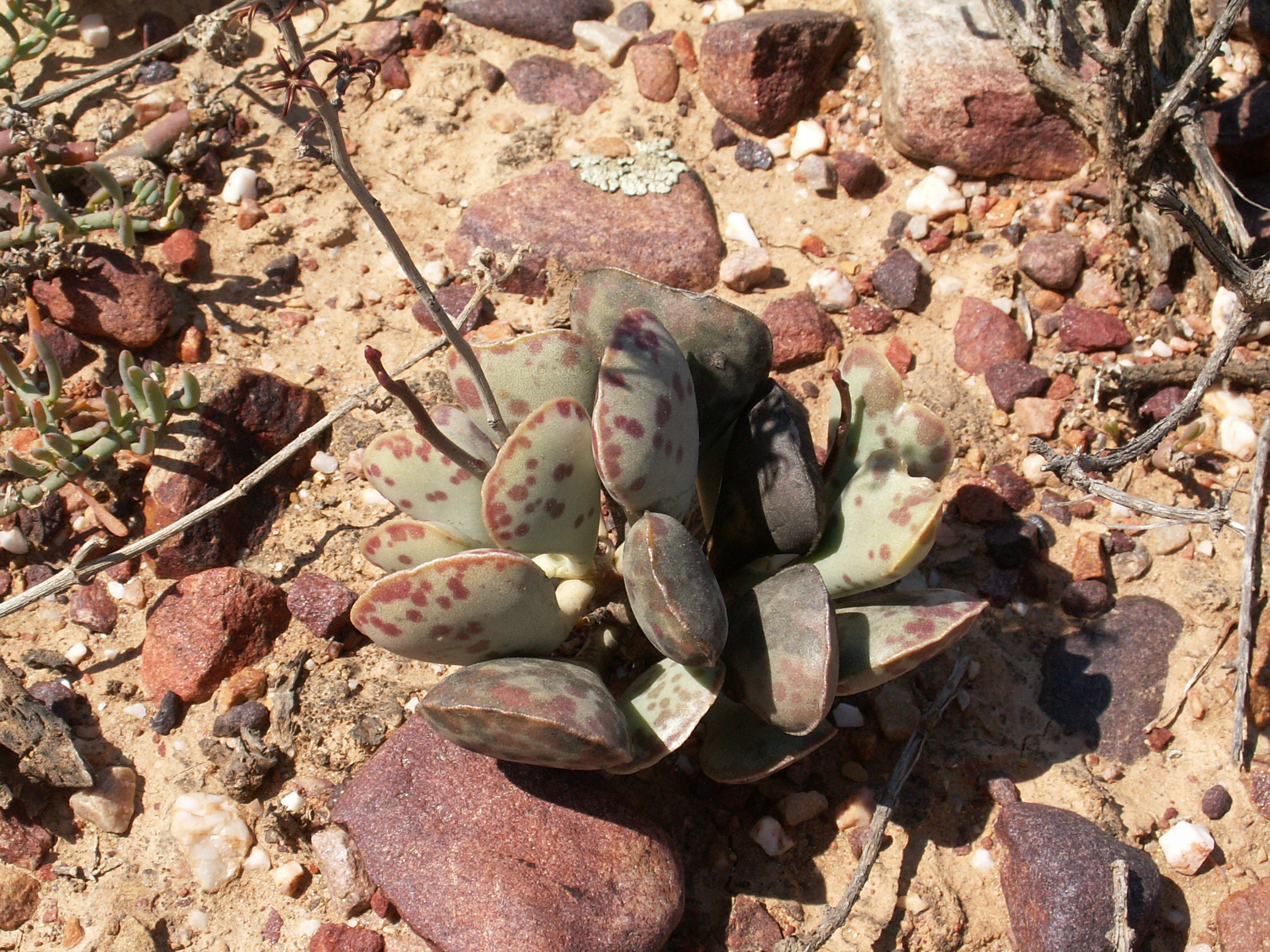 Adromischus triflorus A.Berger, Kleine Karoo nahe Barrydale, Provinz Westkap, Südafrika